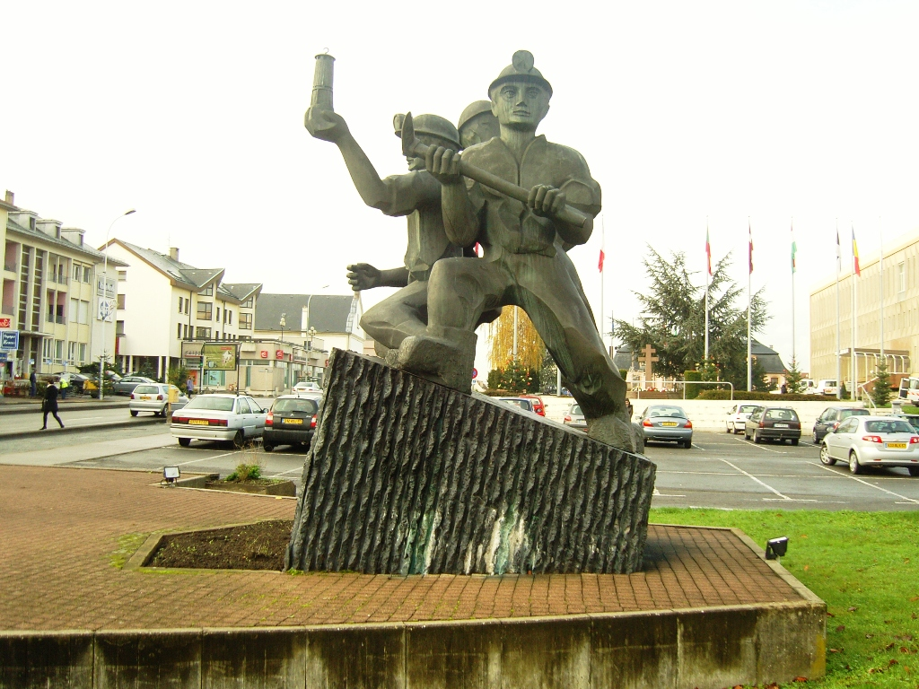 monument